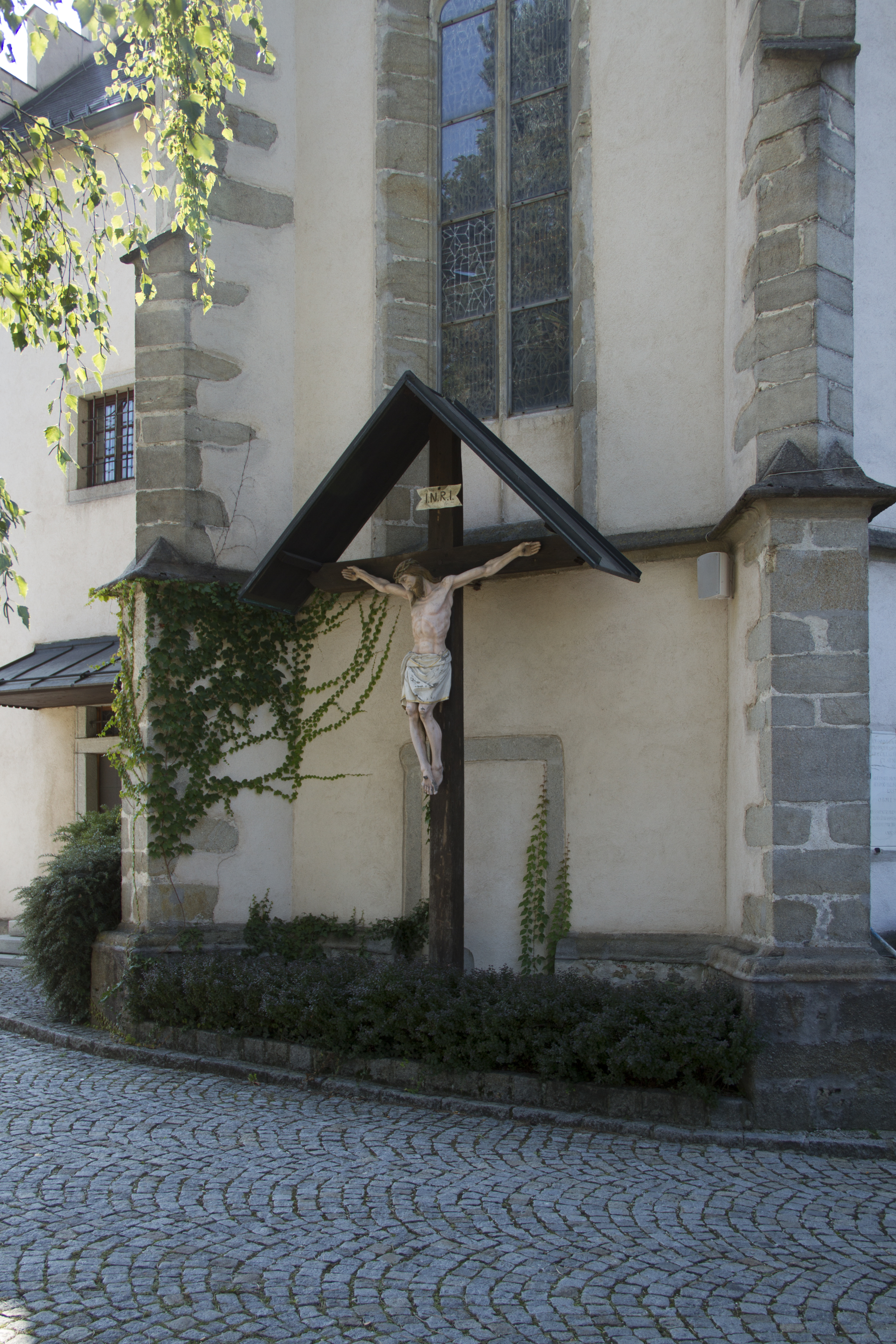 Kath. Pfarrkirche Hl. Philipp und Jakob, Kreuz an der Rückseite, Schwertberg